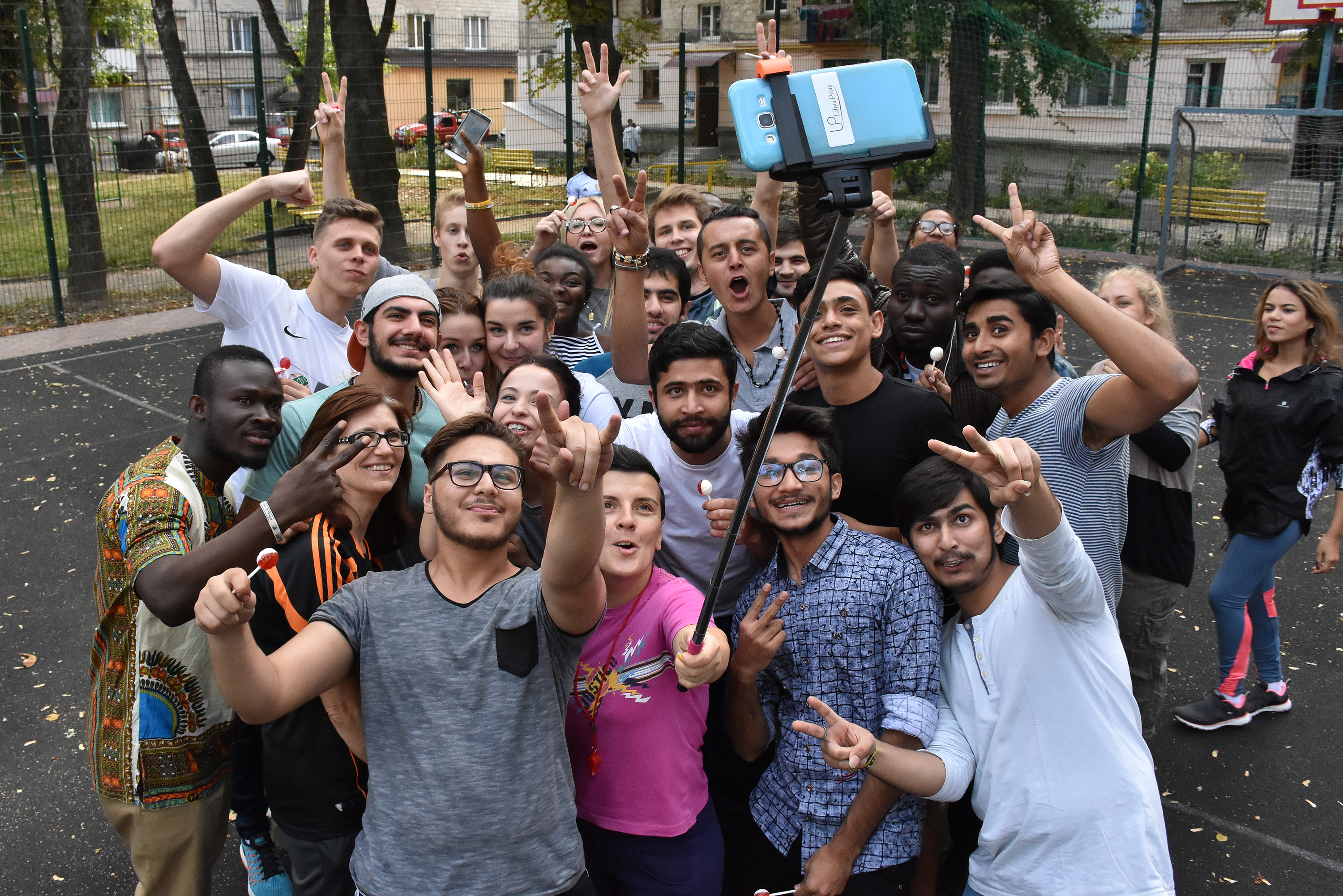 «Веселі старти» для іноземних студентів Тернопільського державного медичного університету імені І. Я. Горбачевського на спортивному майданчику Тернопільського фіздиспансеру на вул. Старий Ринок. Спільна світлина з українською спортсменкою, тренеркою, громадською діячкою Лілія Проць.